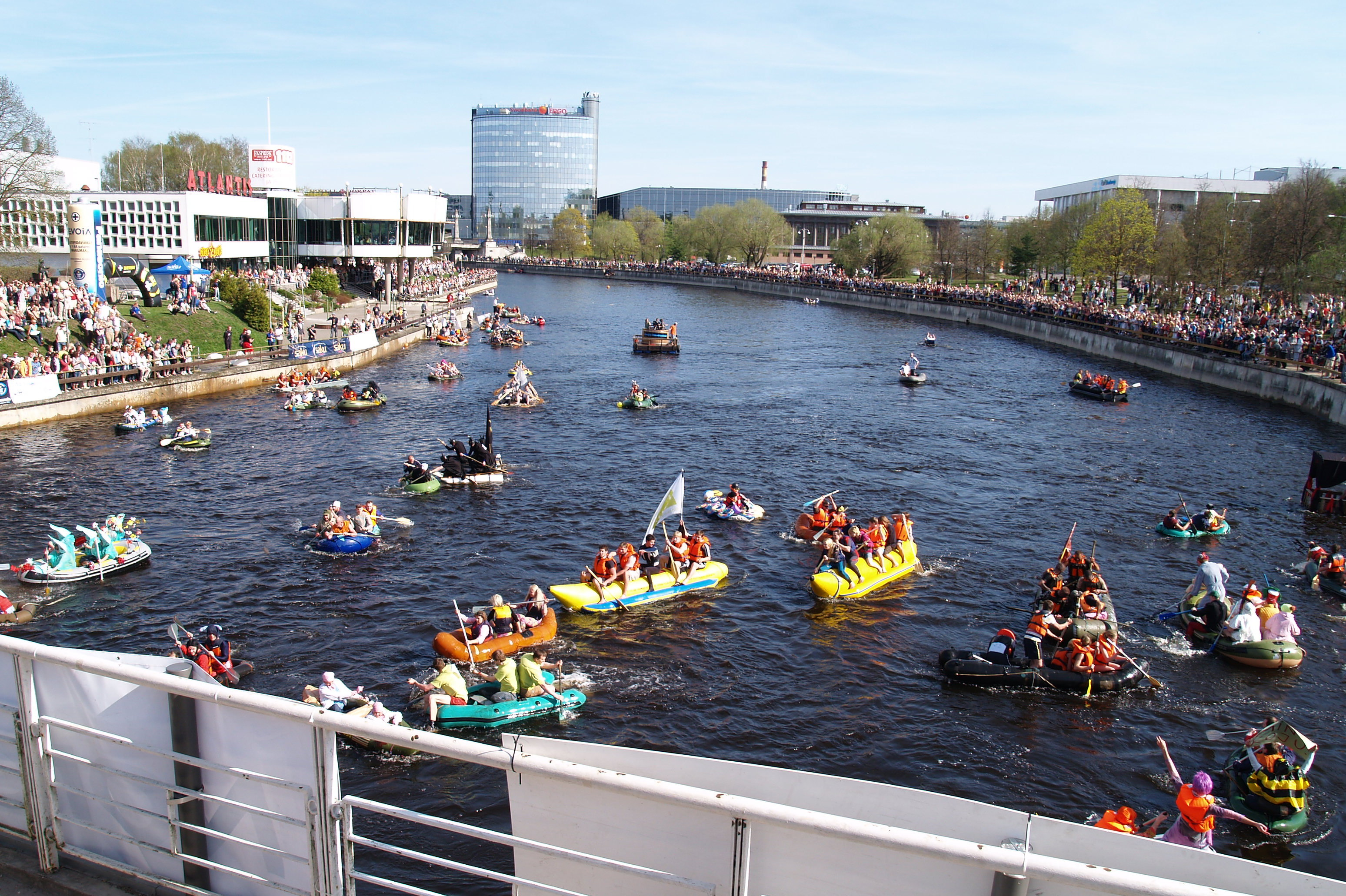 Tudengite kevadpäevad 2009. Paadiralli.